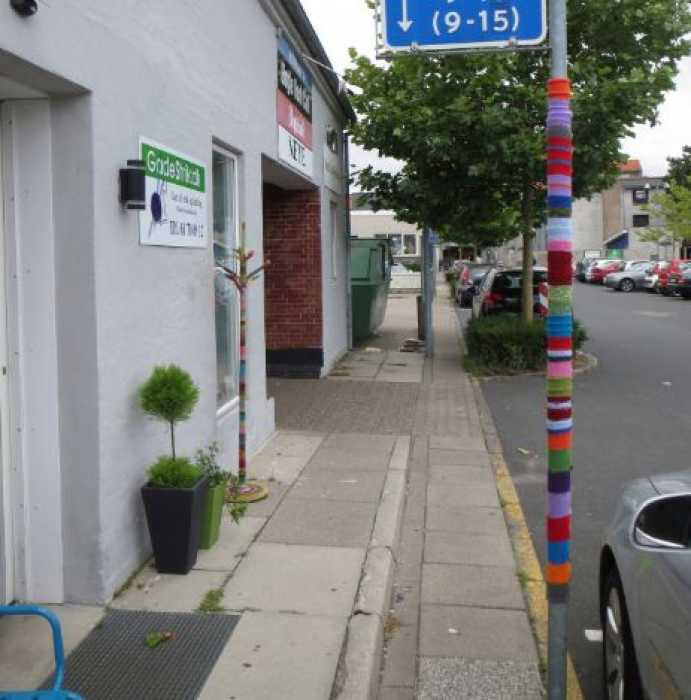 P-skilt før bestjålet gadestrik i Silkeborg, Danmark, 2013